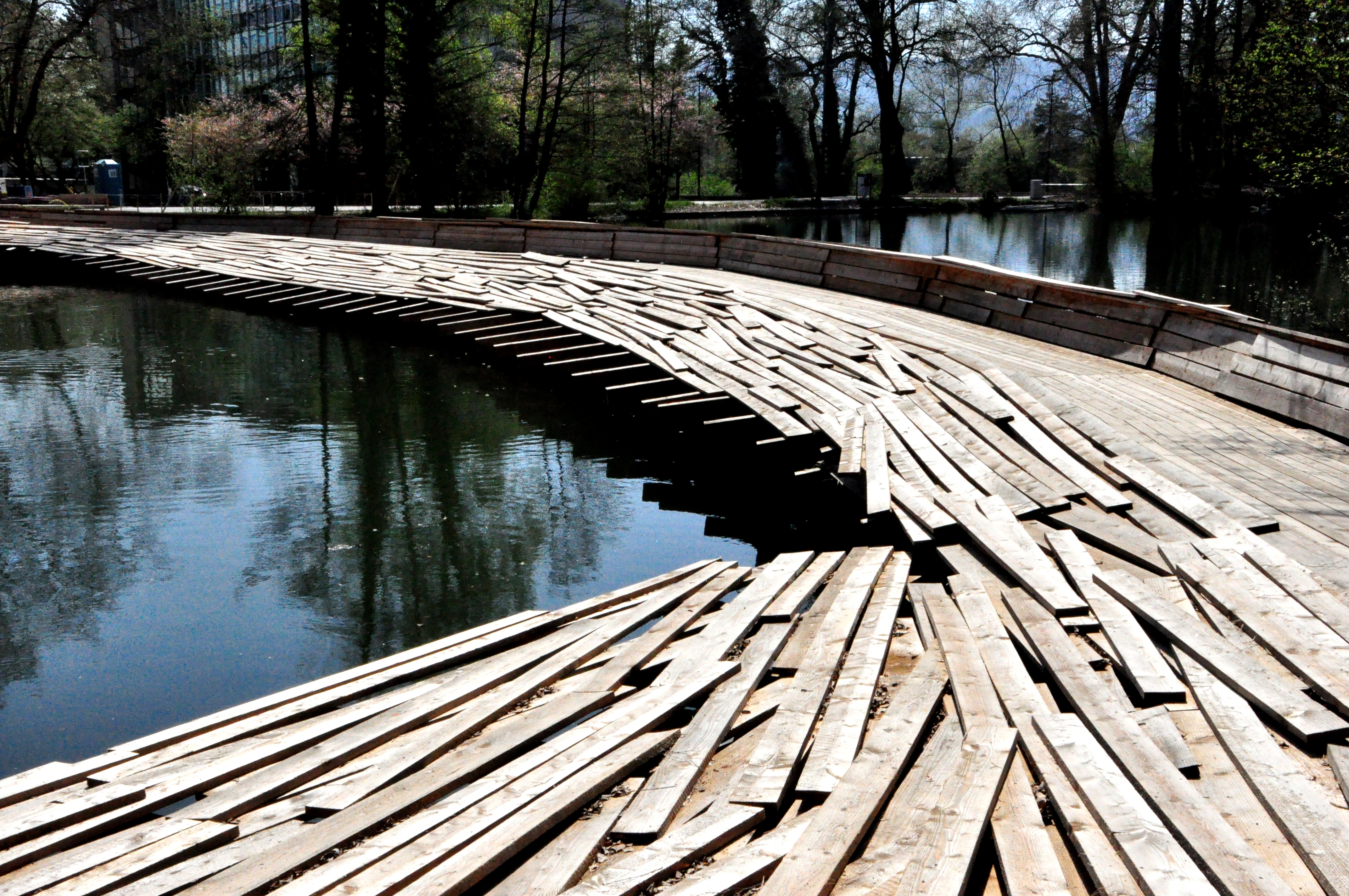 Auf schwankenden Brettern führt uns Tadashi Kawamata über einen Weiher zum zukünftigen Standort des ‹White Cube› von Sol Lewitt, der im neuen Zellweger Park in Uster nun endlich definitiv erstellt wird. Die Werke sind Teil eines umgestalteten Industrieareals und zeigen auf, was Kunst in komplex genutzten öffentlichen Räumen leisten kann. -Kunstbulletin 12/2010